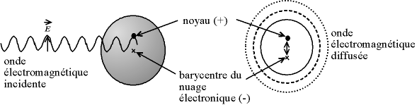 Diffusion Rayleigh (ou diffusion élastique) d'une onde électromagnétique par un atome. Le nuage électronique est déformé par le champ électrique de l'onde. Le barycentre des charges négatives oscille donc par rapport au noyau (positif), il se crée un dipôle électrostatique vibrant qui rayonne dans toutes les directions. Auteur : Christophe Dang Ngoc Chan, réalisé avec un programme de dessin vectoriel Licence GFDL Christophe Dang Ngoc Chan